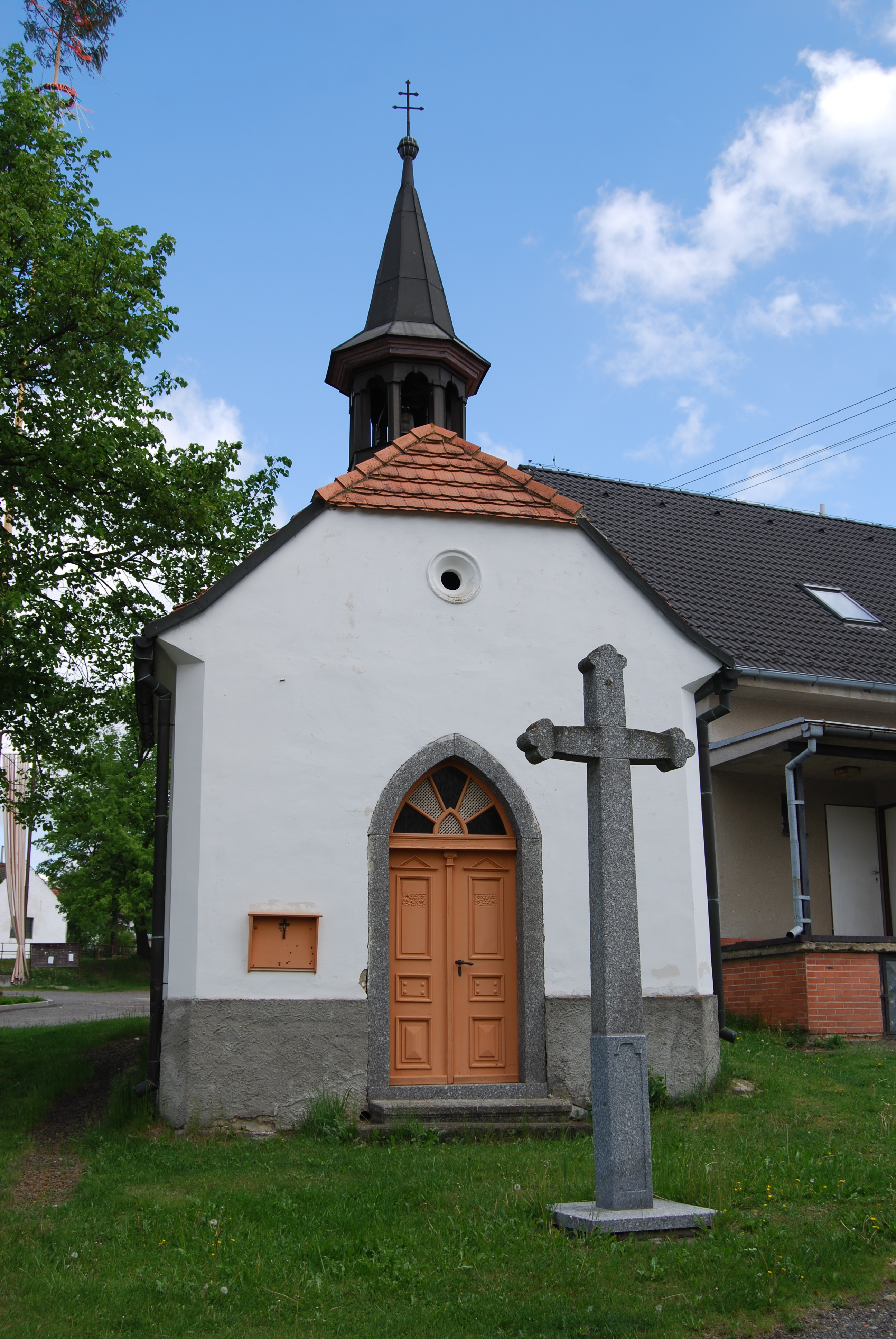 Kaple na návsi je zasvěcena Navštívení Panny Marie a pochází z 19. století. Přeborov. Okres Písek. Česká republika.